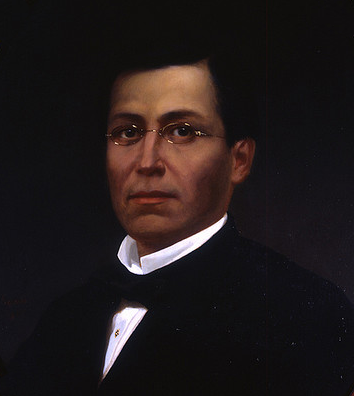 General Ignacio Zaragoza. El triunfador del 5 de mayo frente a los franceses. Óleo sobre tela, Tejada. Acervo /archivo : Museo Nacional De Historia INAH